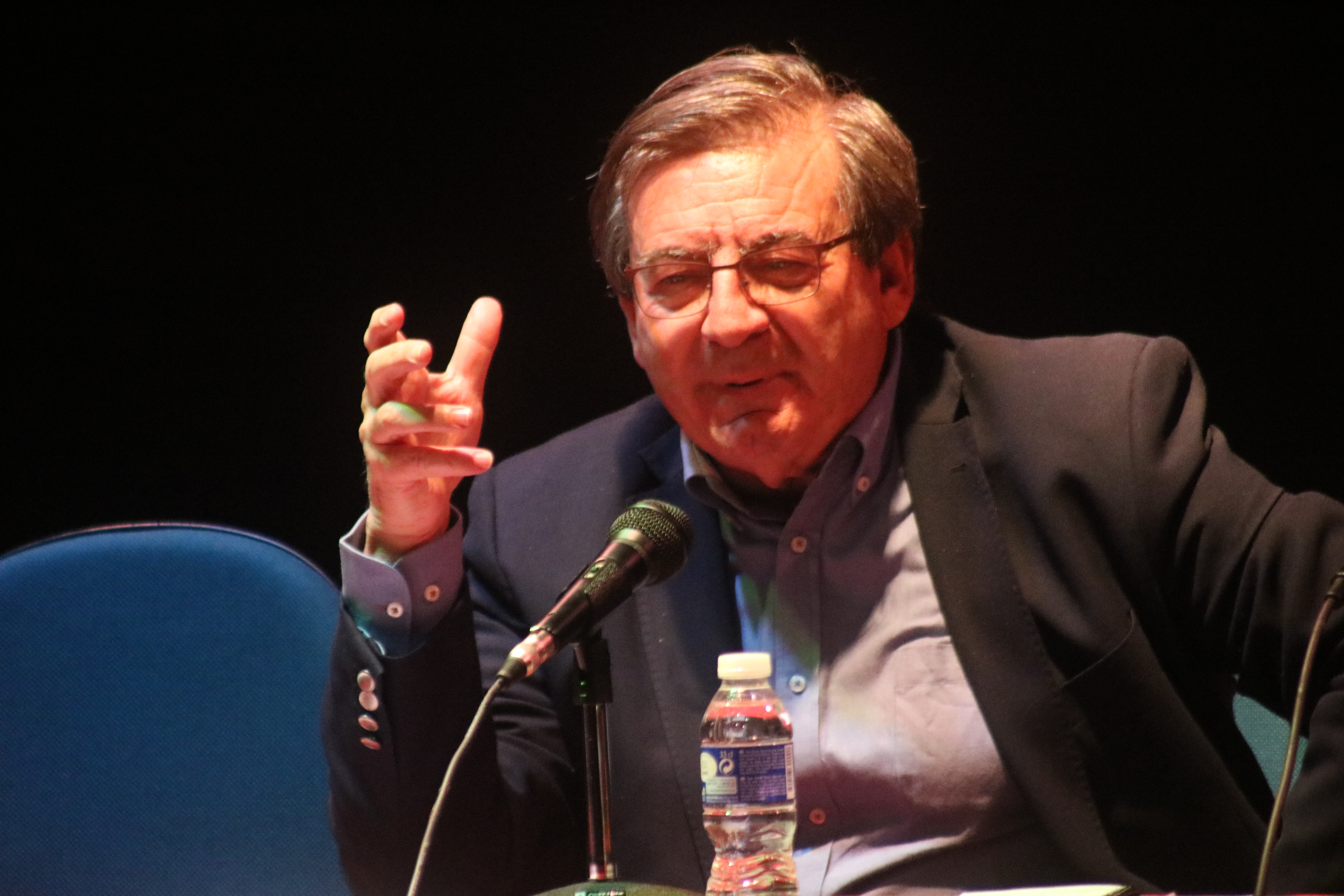 IV Jornadas de Memoria Histórica